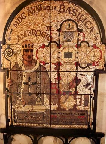 Mosaico realizzato da Aldo Matteotti raffigurante Sant'Ambrogio situato nella Basilica di San Nazaro.